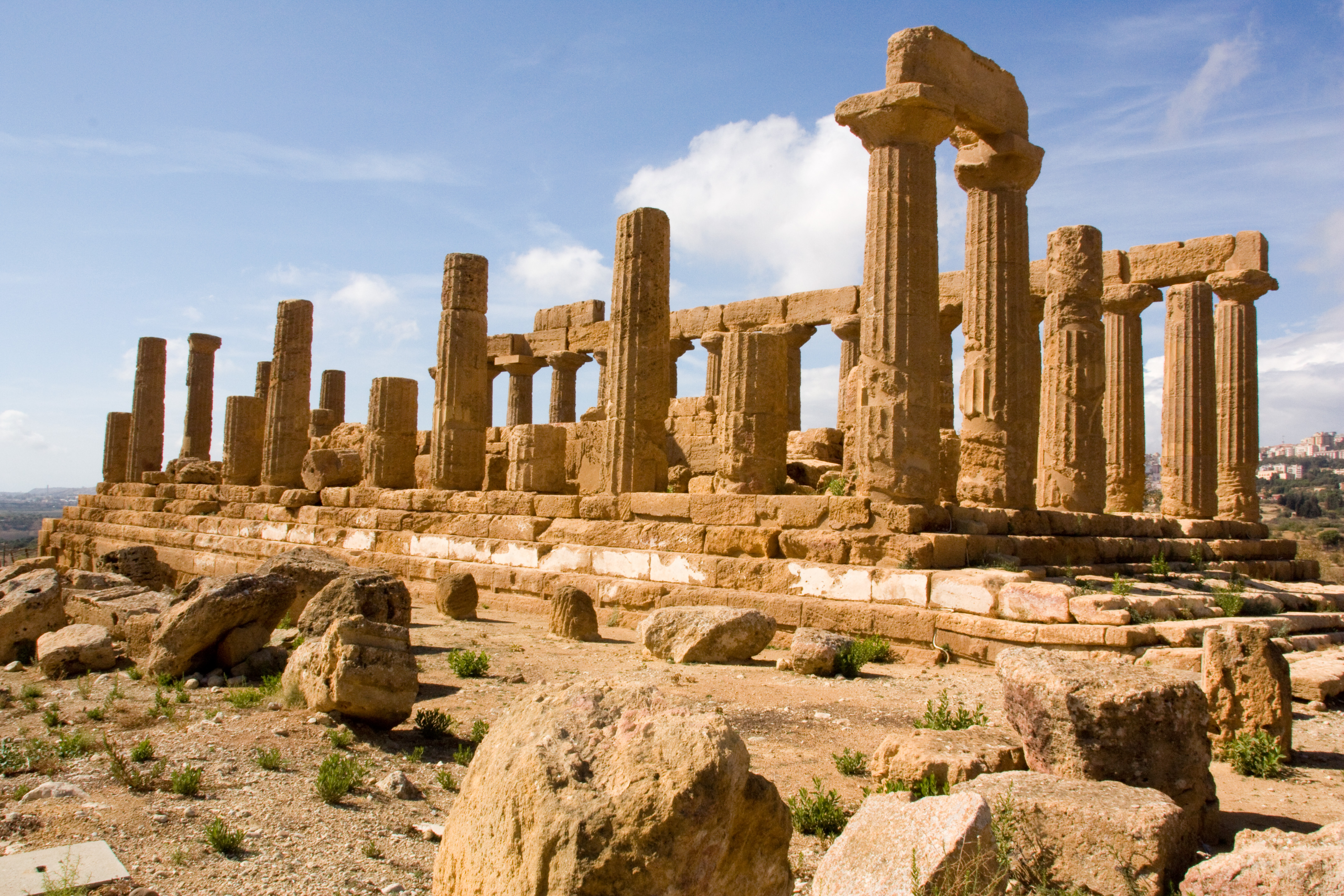 Tempio di Giunone (Temple de Junon), Agrigento , Sicile, Italie